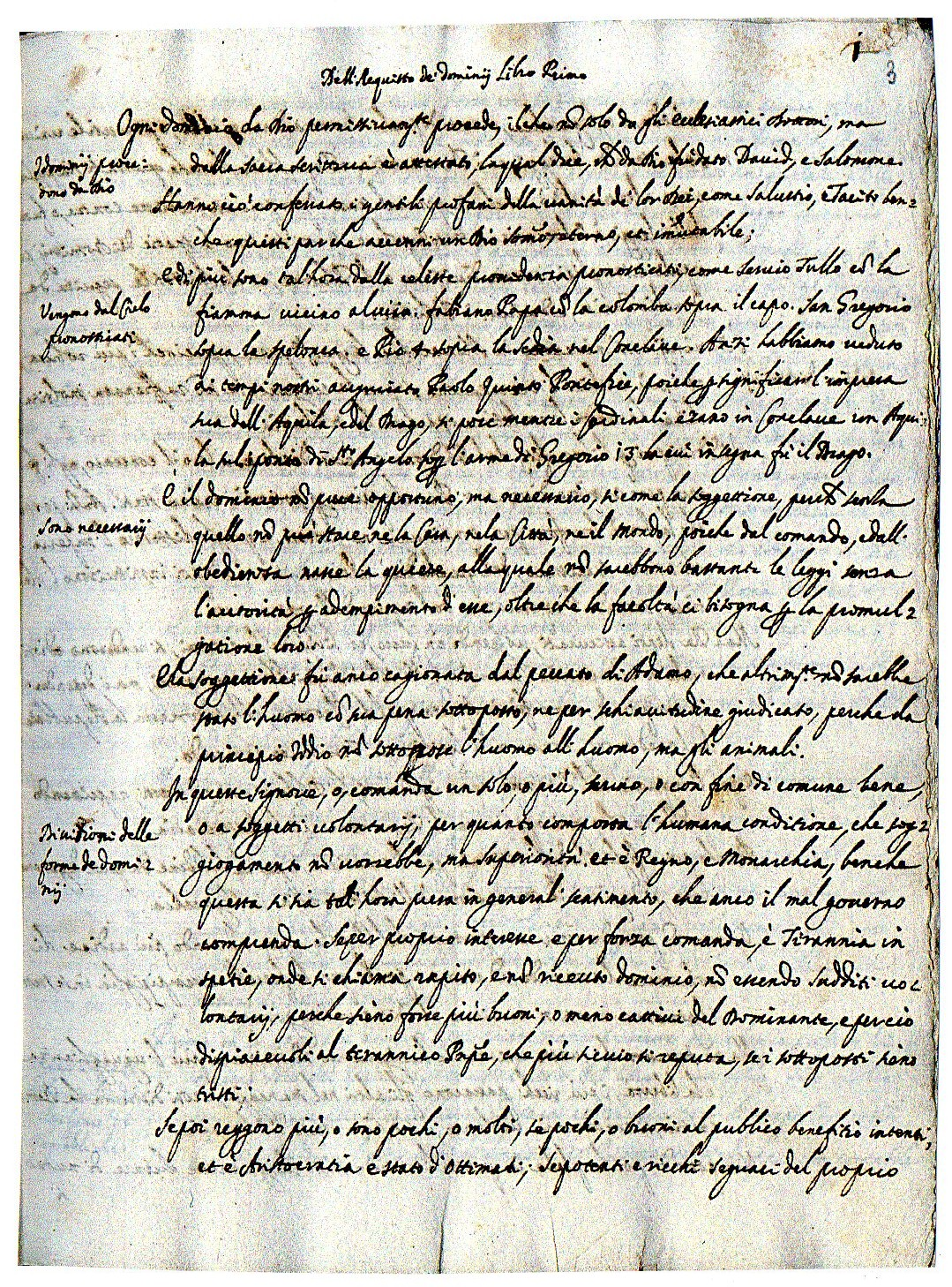 prima pagina, in manoscritto, del trattato politico del perugino Scipione Tolomei "Il Giardino de' Prencipi" (1622/1630), custodito nella Biblioteca Augusta di Perugia